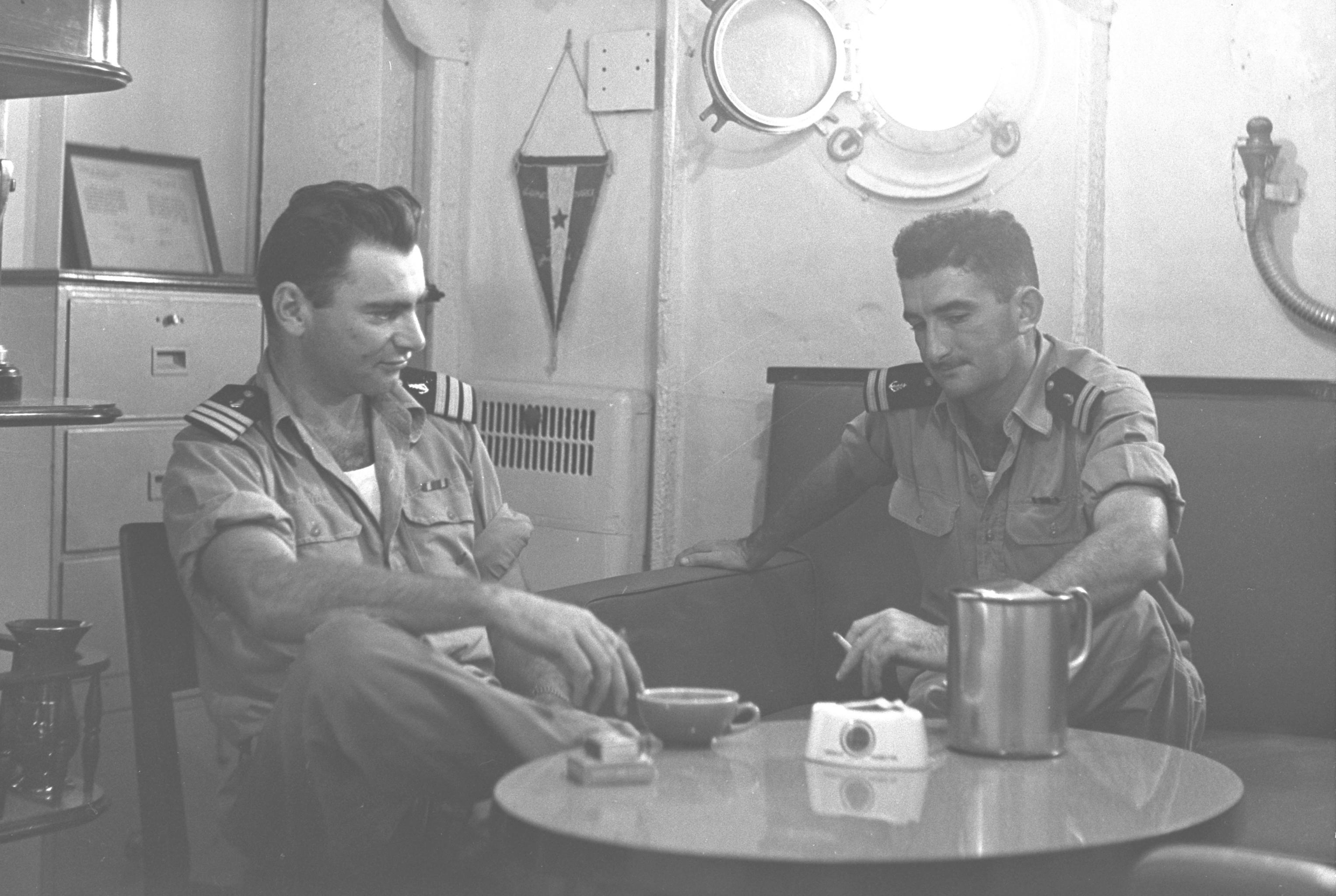 Yohai Ben-Nun and Meir Berka